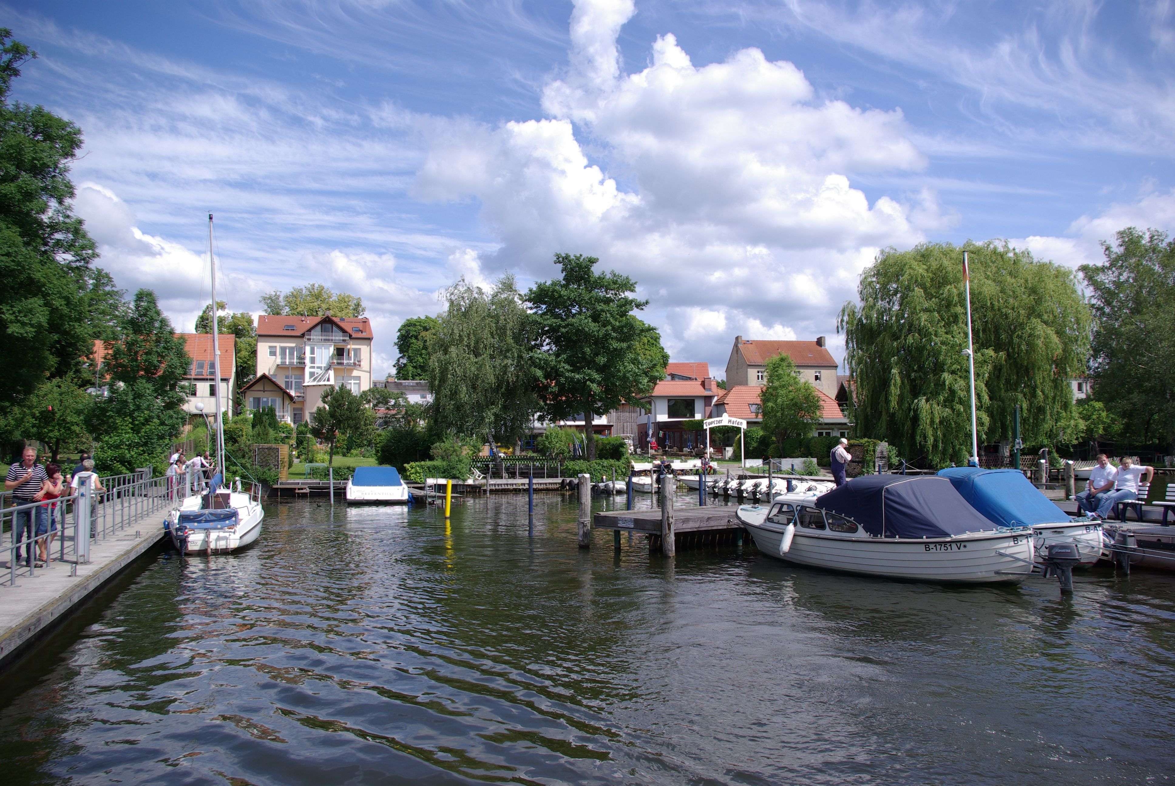 Teupitz in Brandenburg. Die Stadt vom Anleger für die Schifffahrten aus. Im vordergurund der Hafen der Mietboote.